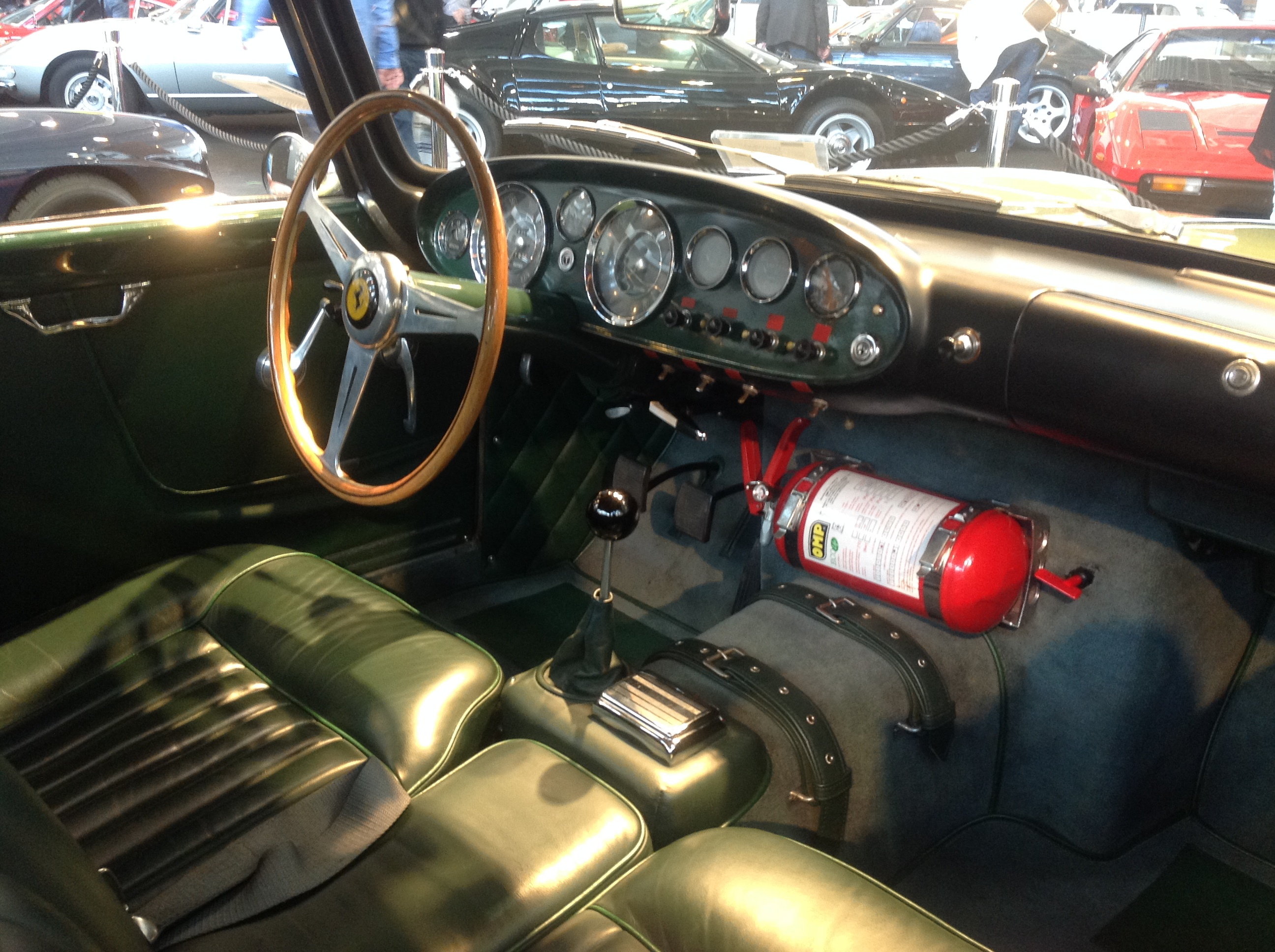 Ferrari 250 GT Ellena Coupe